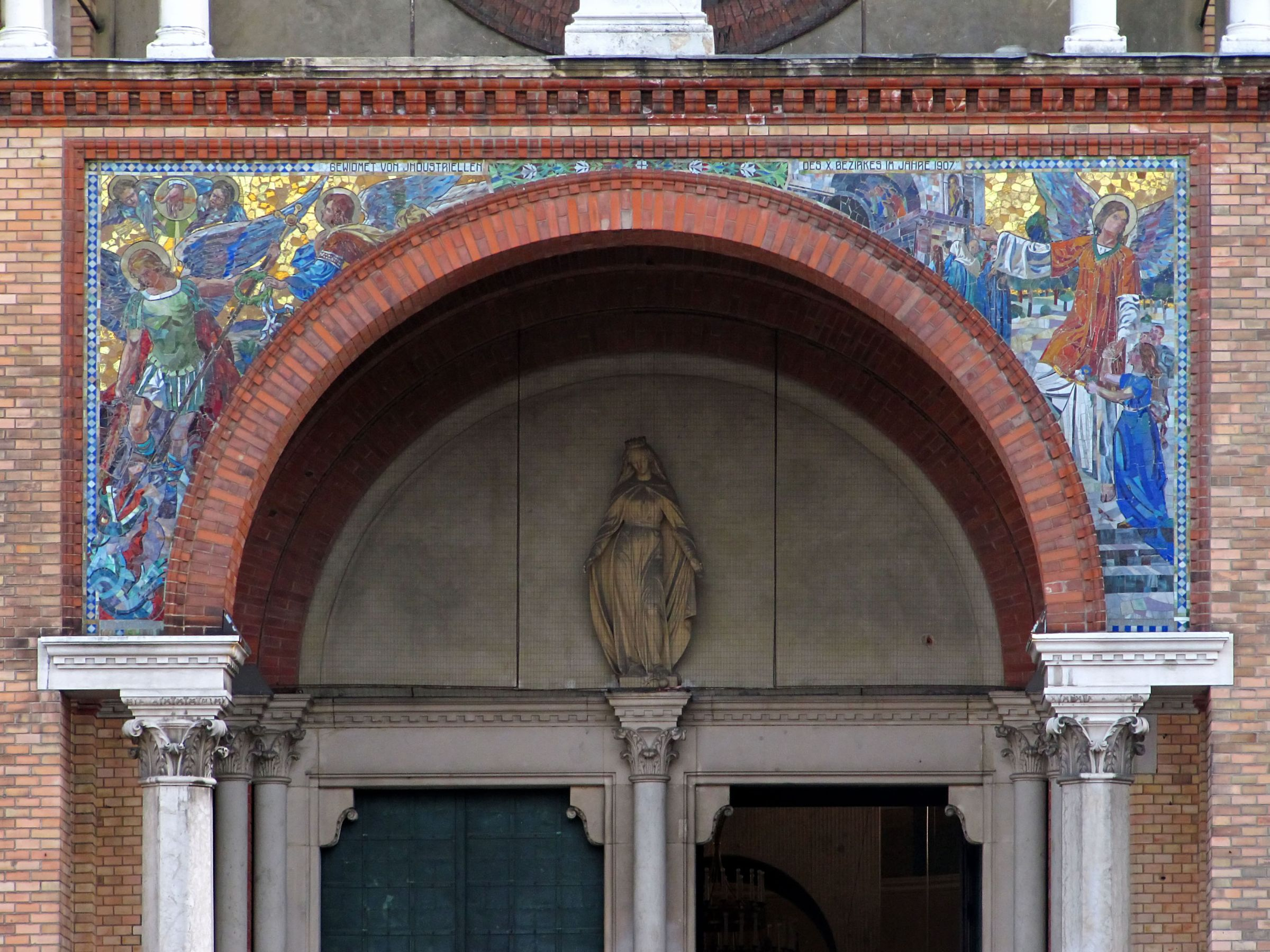 Katholische PfarrkircheHl. Antonius von Padua